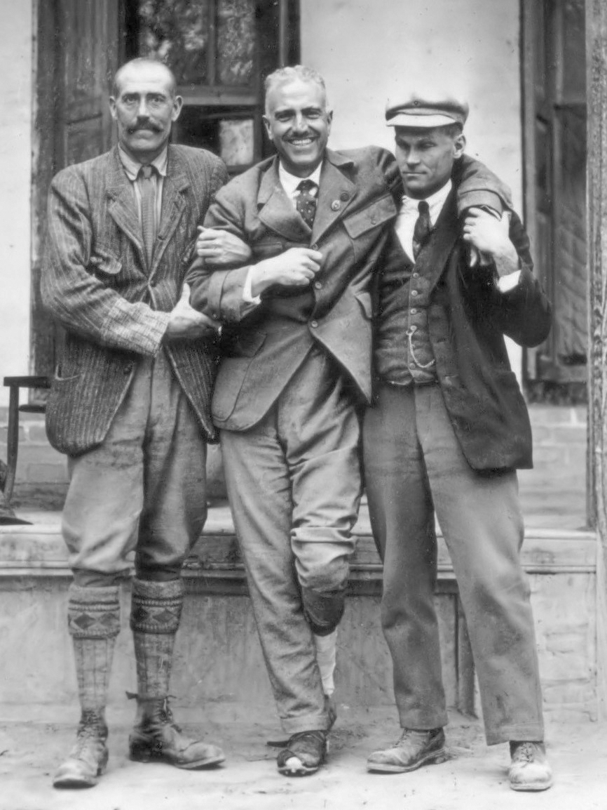 Fotoalbum Visser: Derde Karakorum-expeditie, Birma, Nederlands-Indië 1930. drie mannen, v.l.n.r. Franz Lochmatter, Ph.C. Visser en Rudy Wyss; onderschrift van de foto: Invalide 22 april 1930